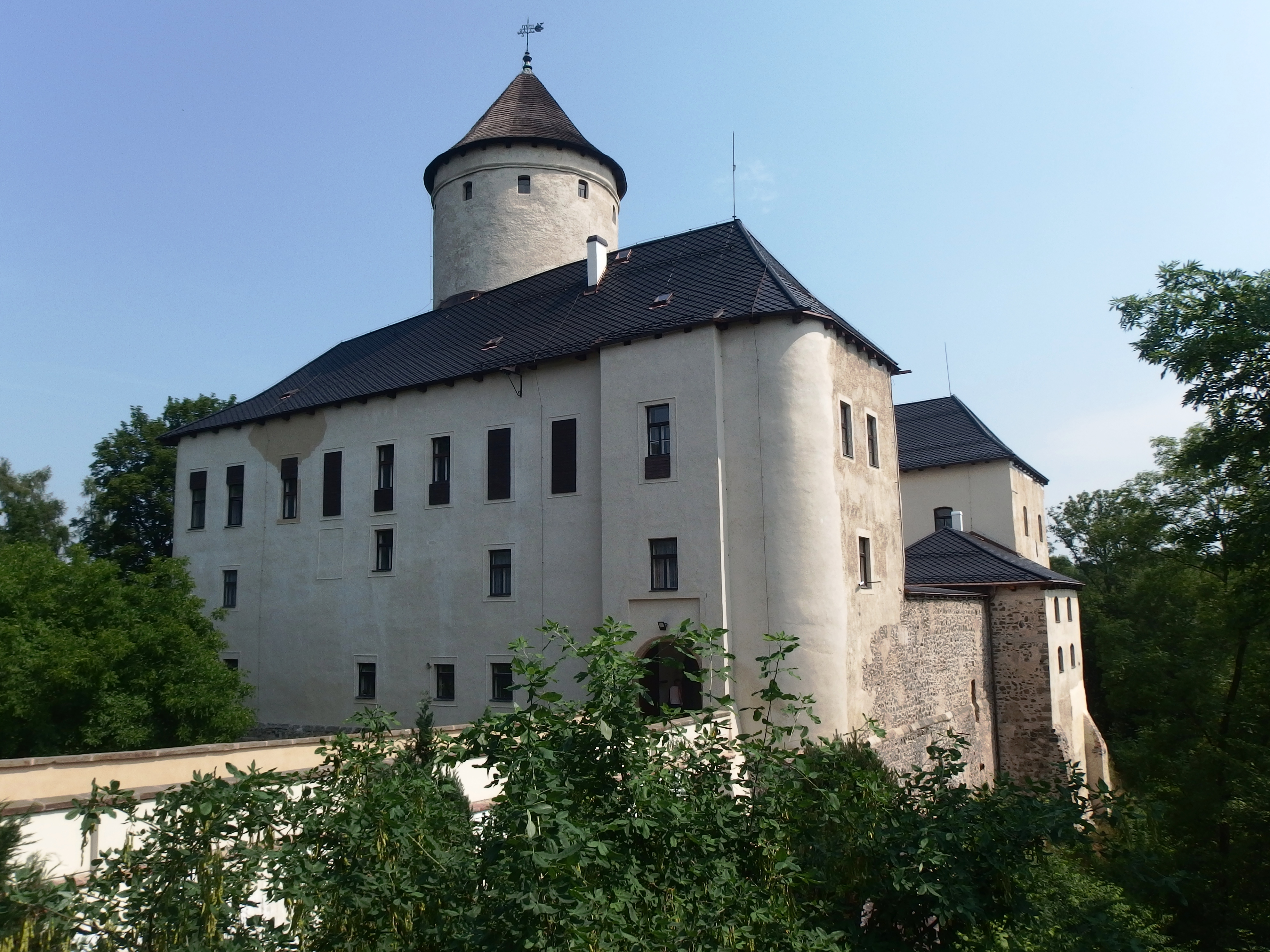 Předhradí (okres Chrudim), okres Chrudim, Česká republika. Hrad Hrad Rychmburk, Předhradí 17.